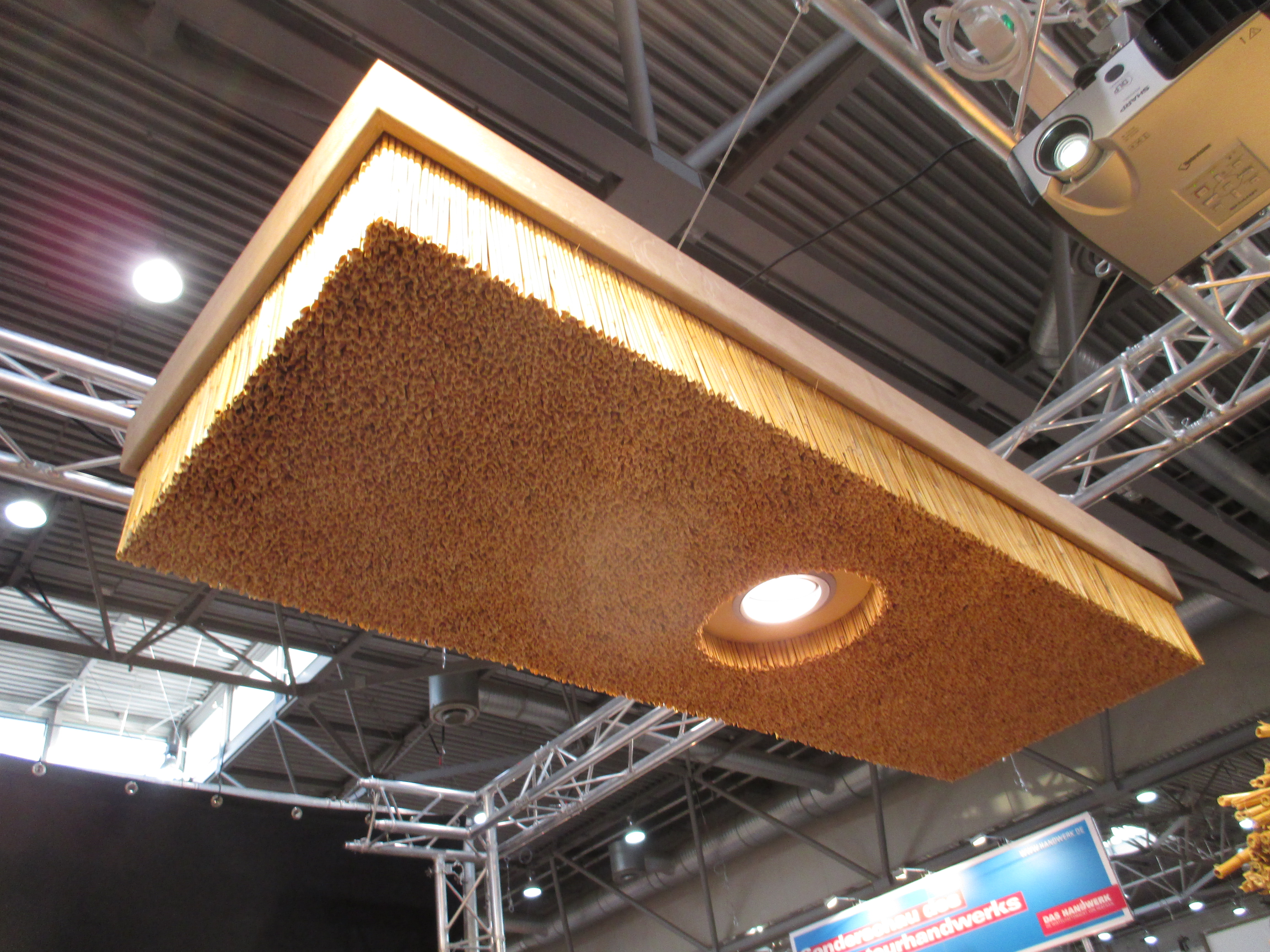 Beleuchtetes Deckenelement aus Schilfrohr der Firma Hiss Reet zur Verbesserung der Raumakustik.